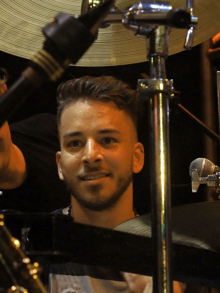 Junior Lima